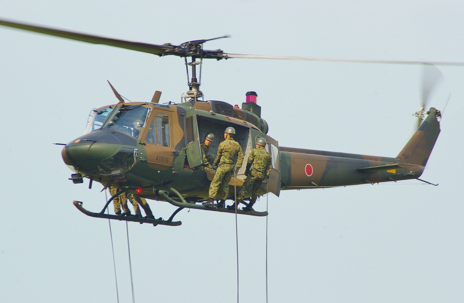 JGSDF UH-1 HueyJ & rapeling infantry in Okadama STA.